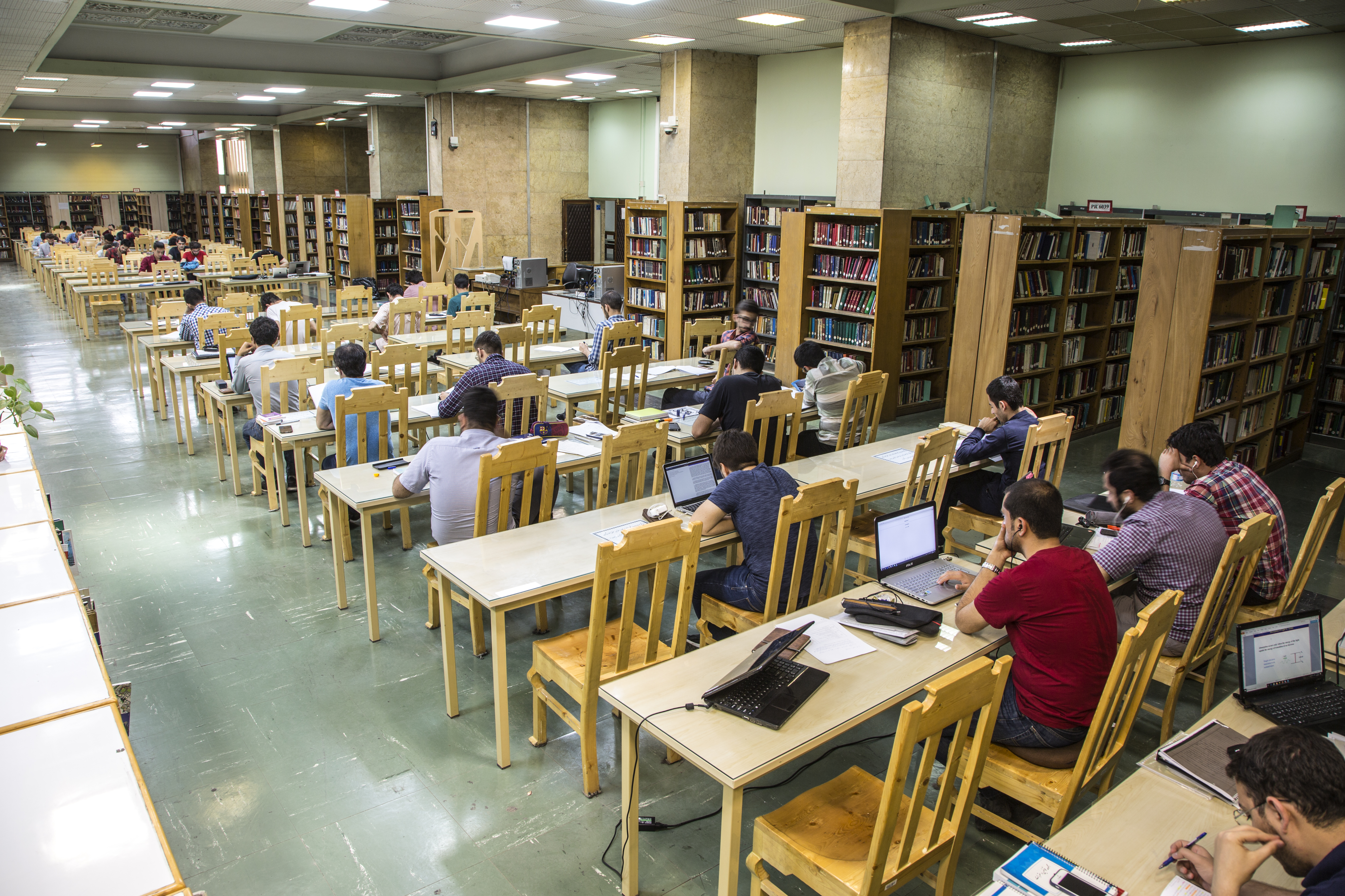 تالار و سالن مطالعه کتابخانه مرکزی و مرکز اسناد دانشگاه تهران